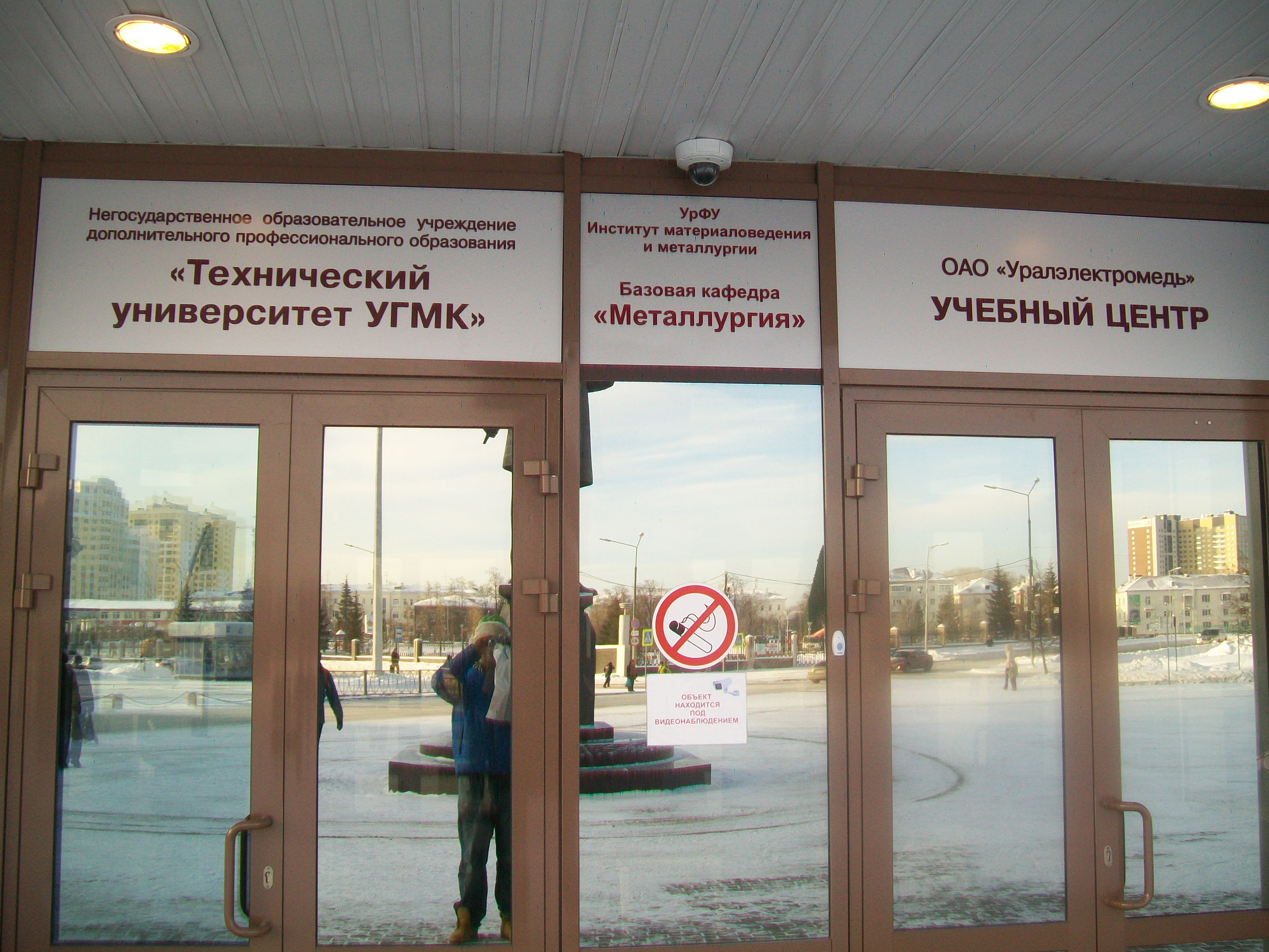 Три вывески перед входом в Технический университет УГМК показывают какие организации его создали